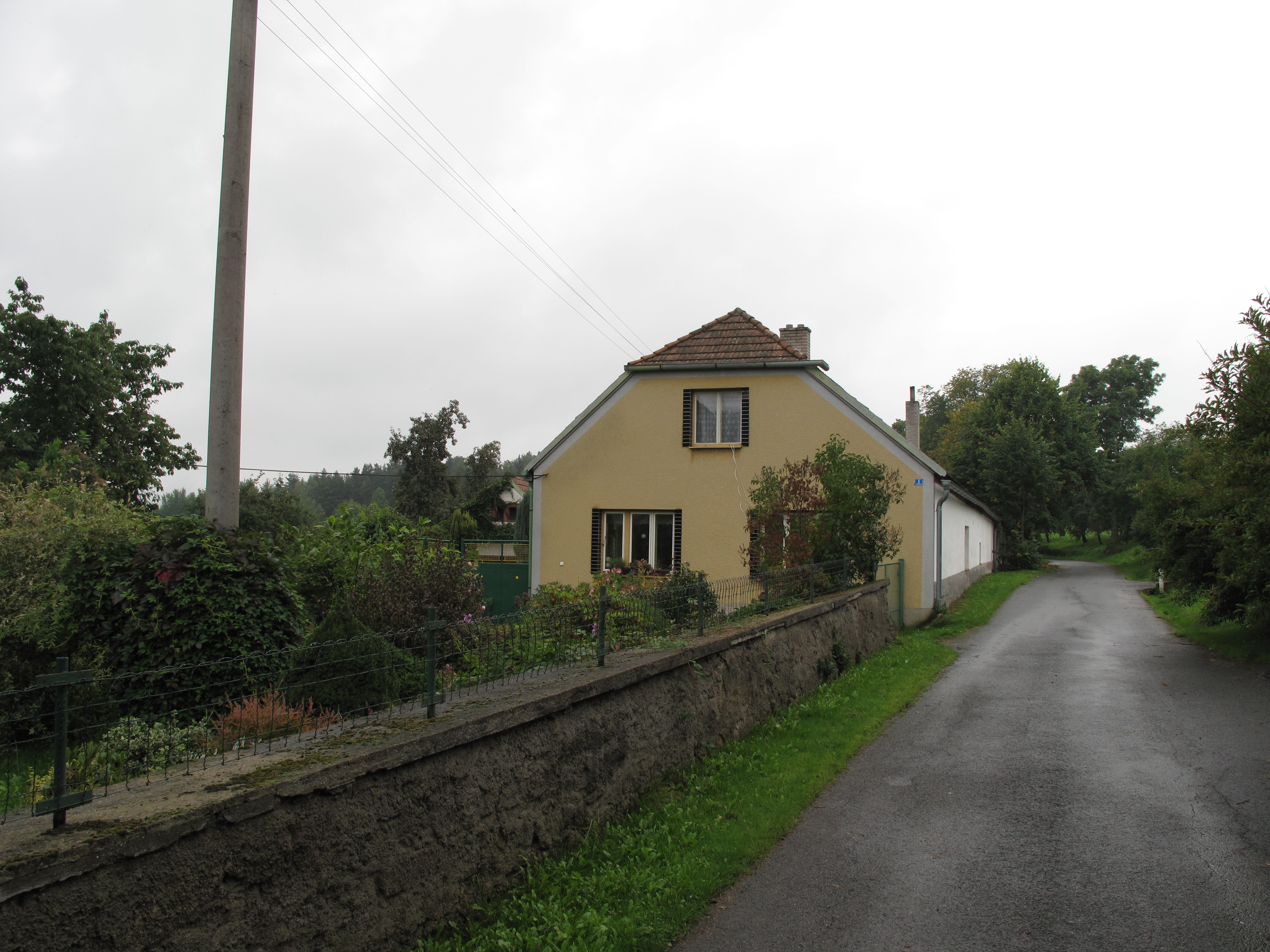 Dům u cesty v Hořejšicích. Okres Strakonice, Česká republika.